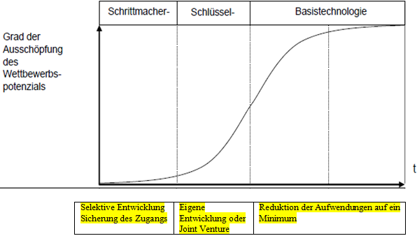 Investitionsprioritäten für Technologiestrategien